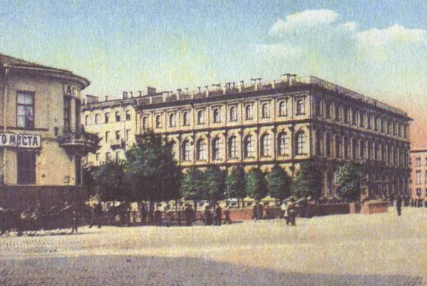 Открытка с видом Синего моста через реку Мойку в Санкт-Петербурге.Размер для корректного отображения в функции Thumb